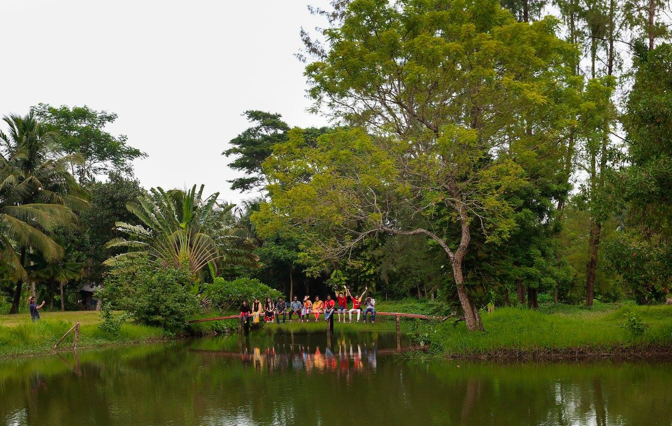 অরুণিমা ইকোপার্ক